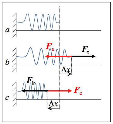 Indar elastikoen eskema